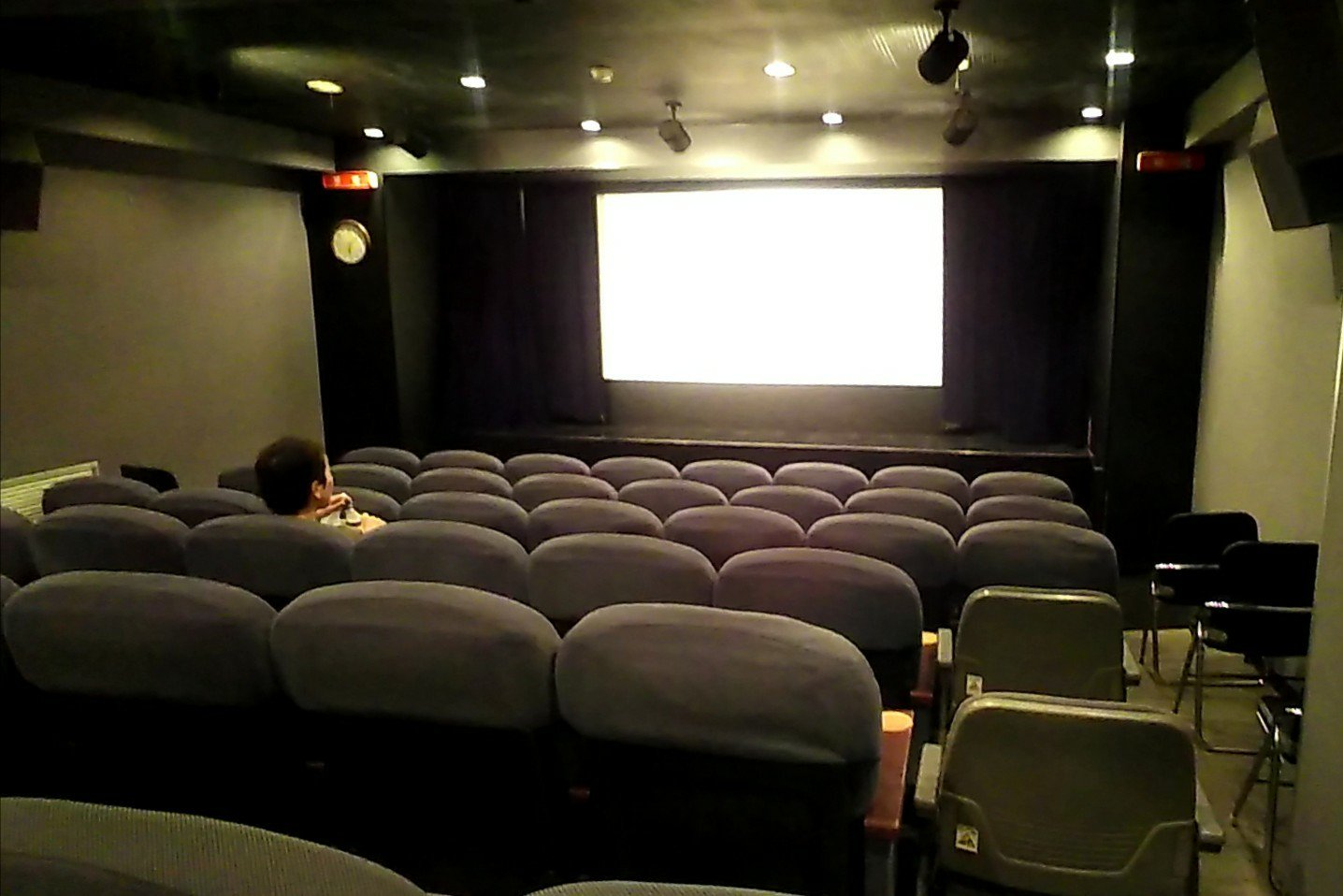 愛知県名古屋市中村区椿町にある映画館「シネマスコーレ」。